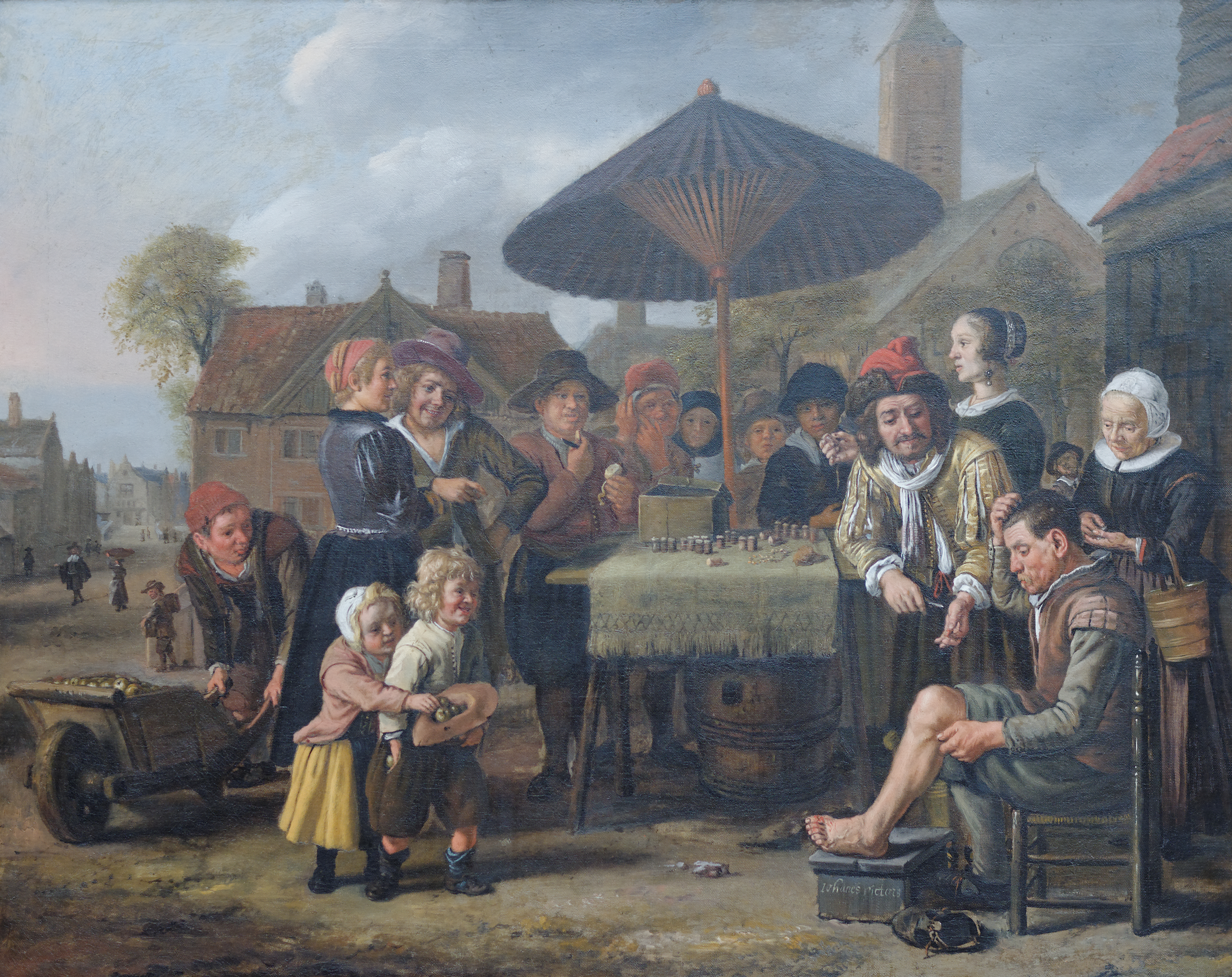 Le Charlatan, Jan Victors vers 1650-55. Musée des beaux-arts de Budapest Inv N°1331. Acquis à Londre en 1894